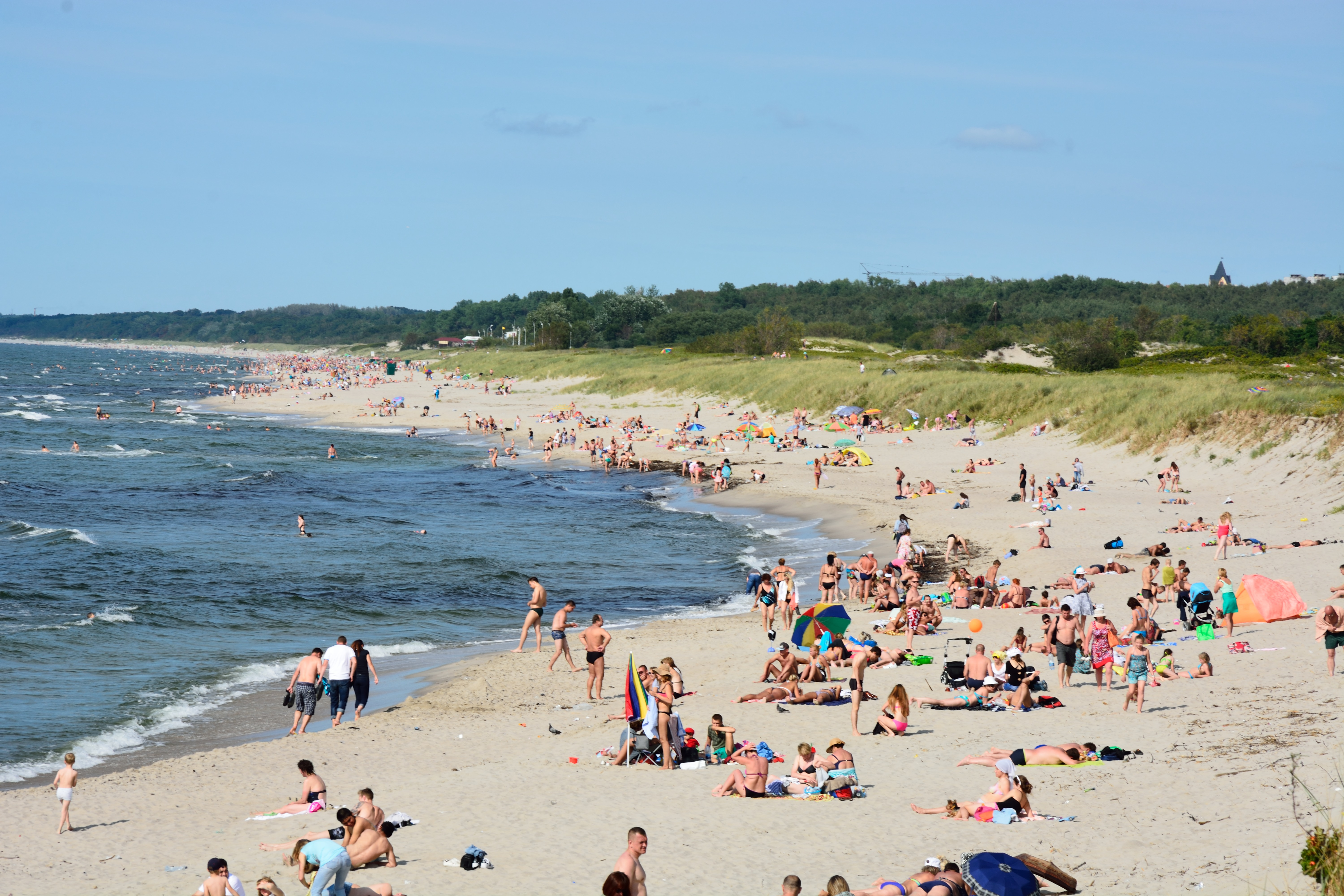 Baltiysk, Kaliningrad Oblast, Russia